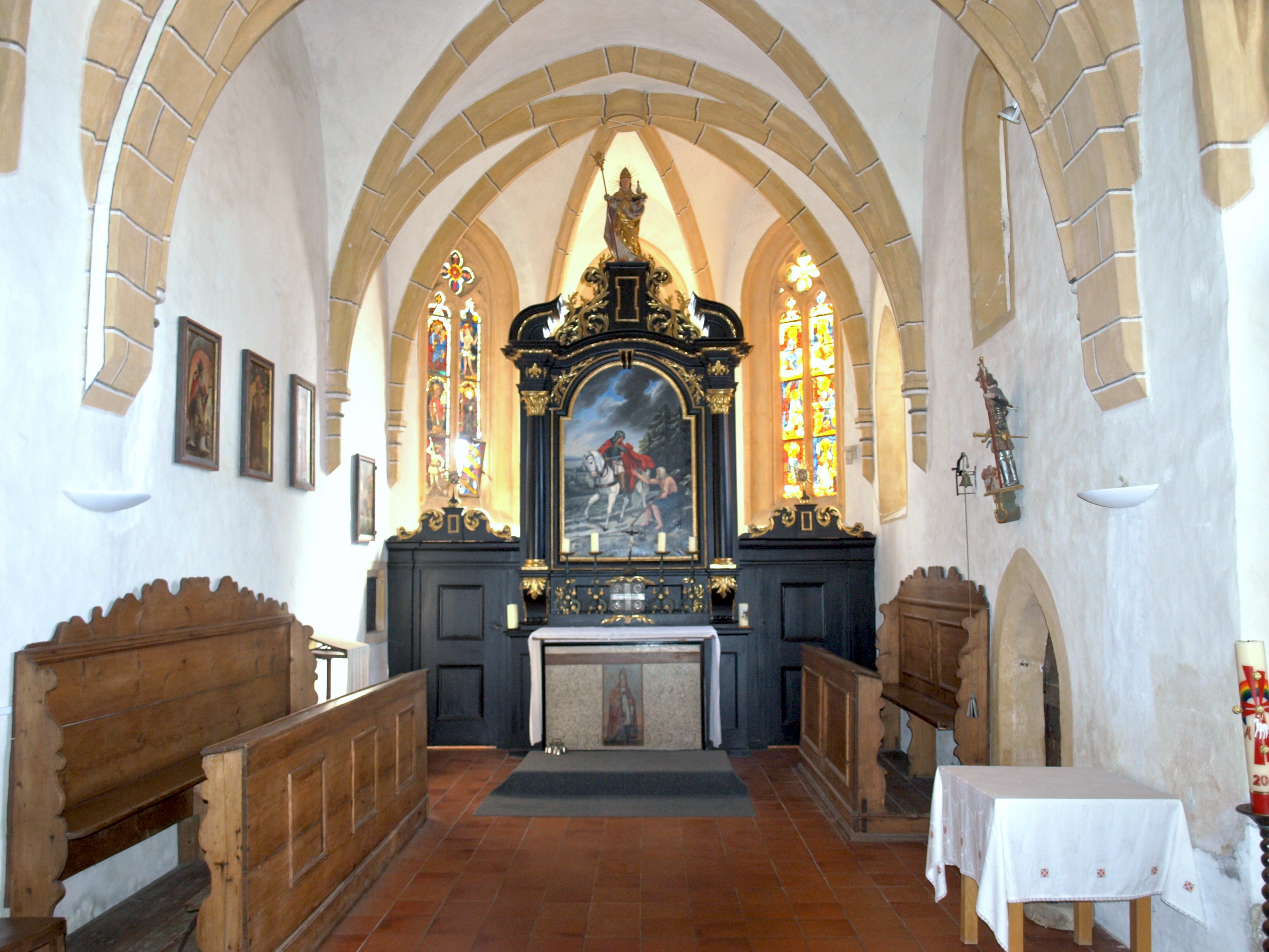 Kath. Filialkirche hl. Martin